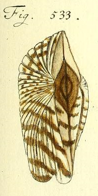 Arca navicularis Bruguière, 1789, Arcidae, Bivalvia, unknow locality (West India), from Johann Hieronymus Chemnitz: Neues systematisches Conchylien-Cabinet. Siebender Band. Mit drey und dreyßig nach der Natur gemalten und durch lebendige Farben erleuchteten Kupfertafeln. S. 1-356, Tab. 37-69, Raspe, Nürnberg 1789, pl. 54, fig. 533